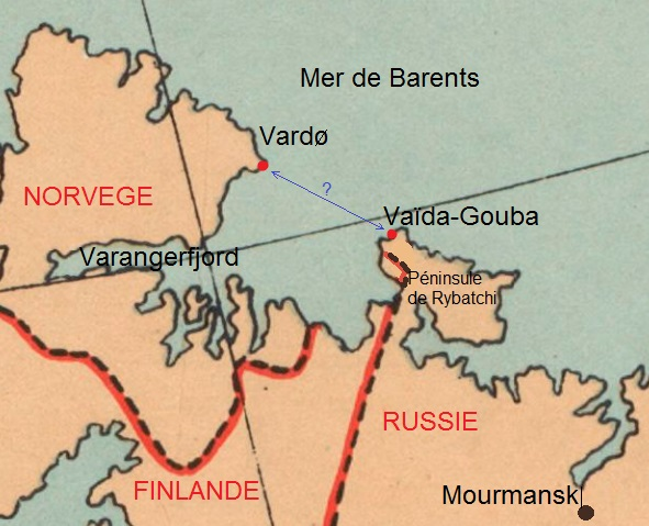 Carte montrant, en bleu, le lieu supposé de la disparition, le 1er octobre 1920, de Raymond Lefebvre, Jules Lepetit et Marcel Vergeat.